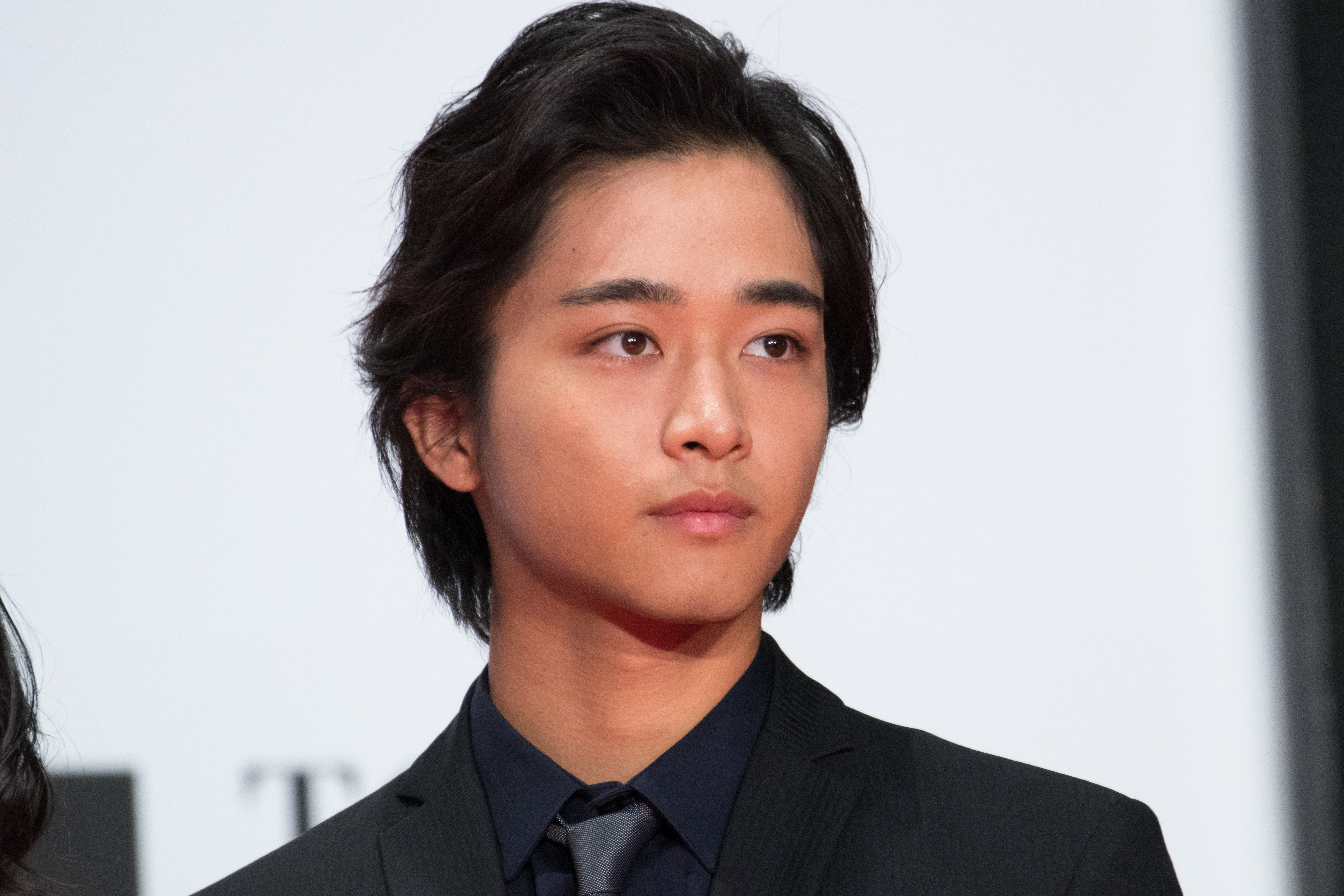 第29回 東京国際映画祭 オープニングセレモニー 佐藤寛太 (イタズラなKiss THE MOVIE ～ハイスクール編～)